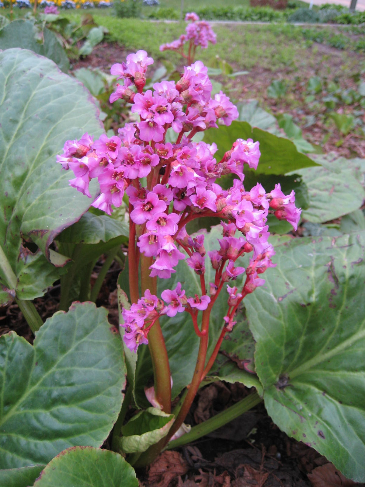 Bergenia cordifolia - Blüte - Im Bot. Garten Berlin Dahlem